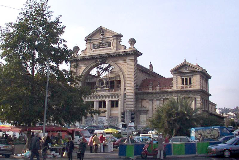 Nice-Place de la Liberation Vue de la rue Quartier Saint-Lambert